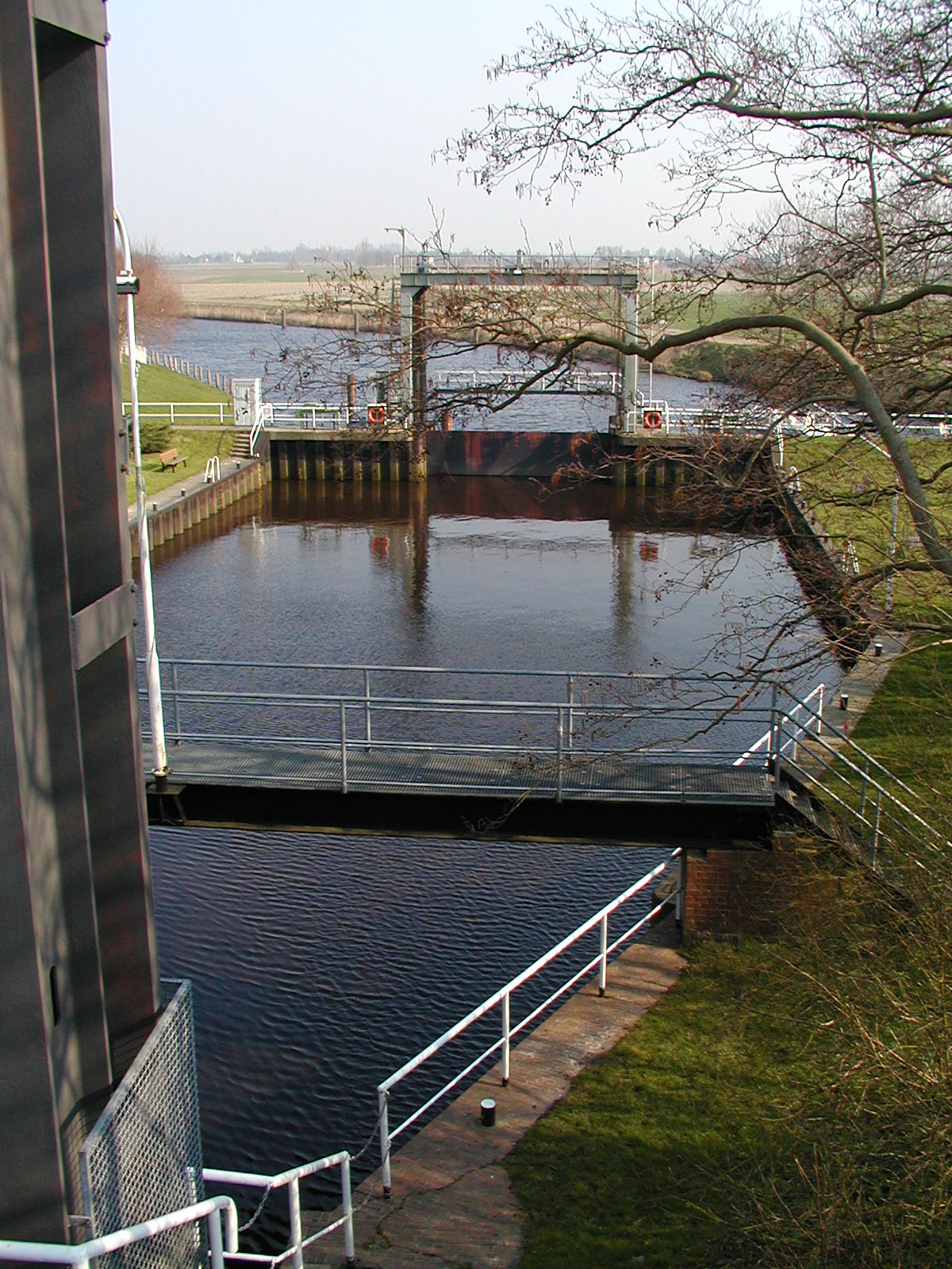 Das Scheusbecken der Schleuse